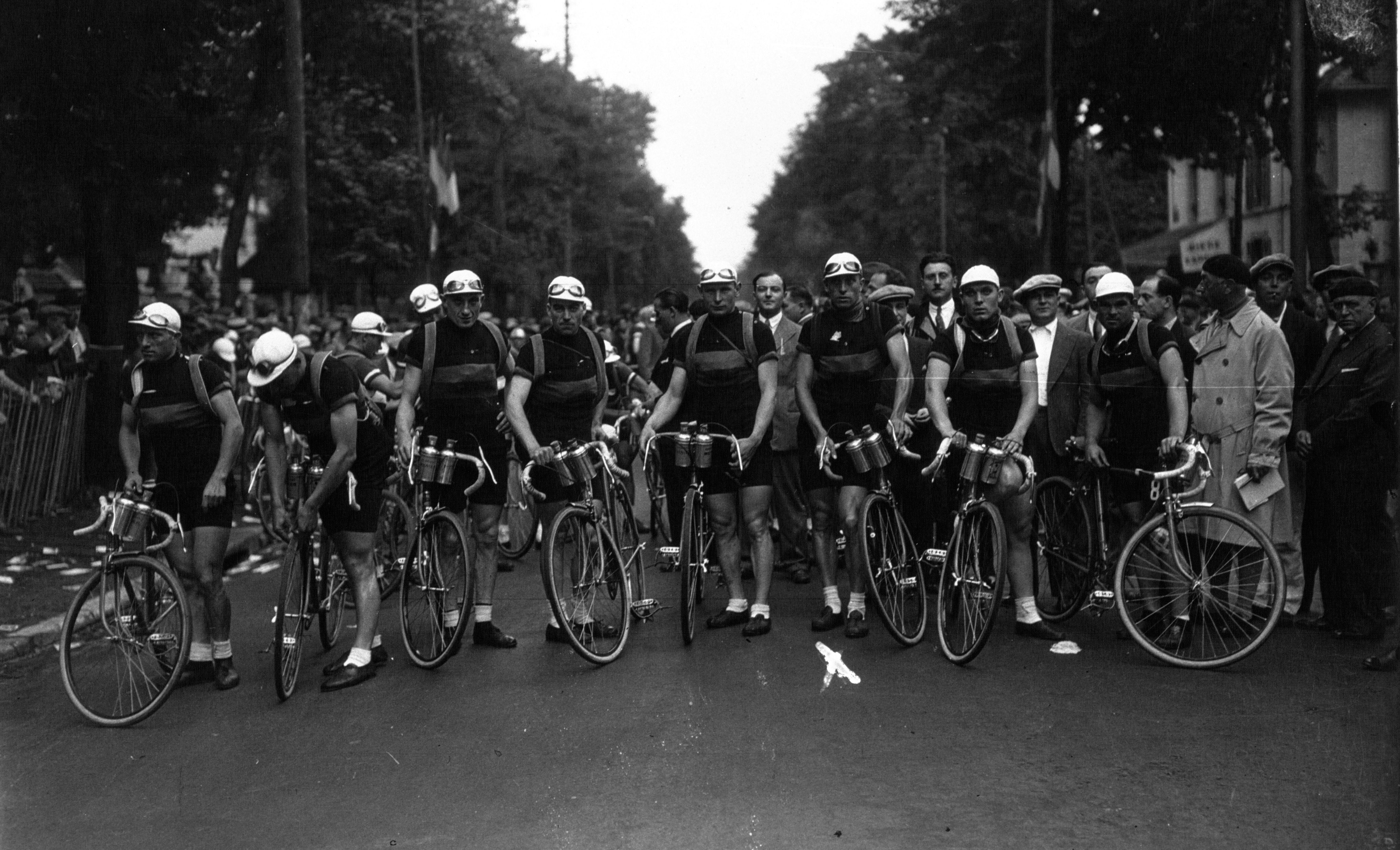 L'équipe belge lors du Tour de France 1932 : de gauche à droite Jef Demuysere, Alfons Schepers, Georges Ronsse, Georges Lemaire, Gérard Loncke, Jean Aerts, Frans Bonduel, et Gaston Rebry